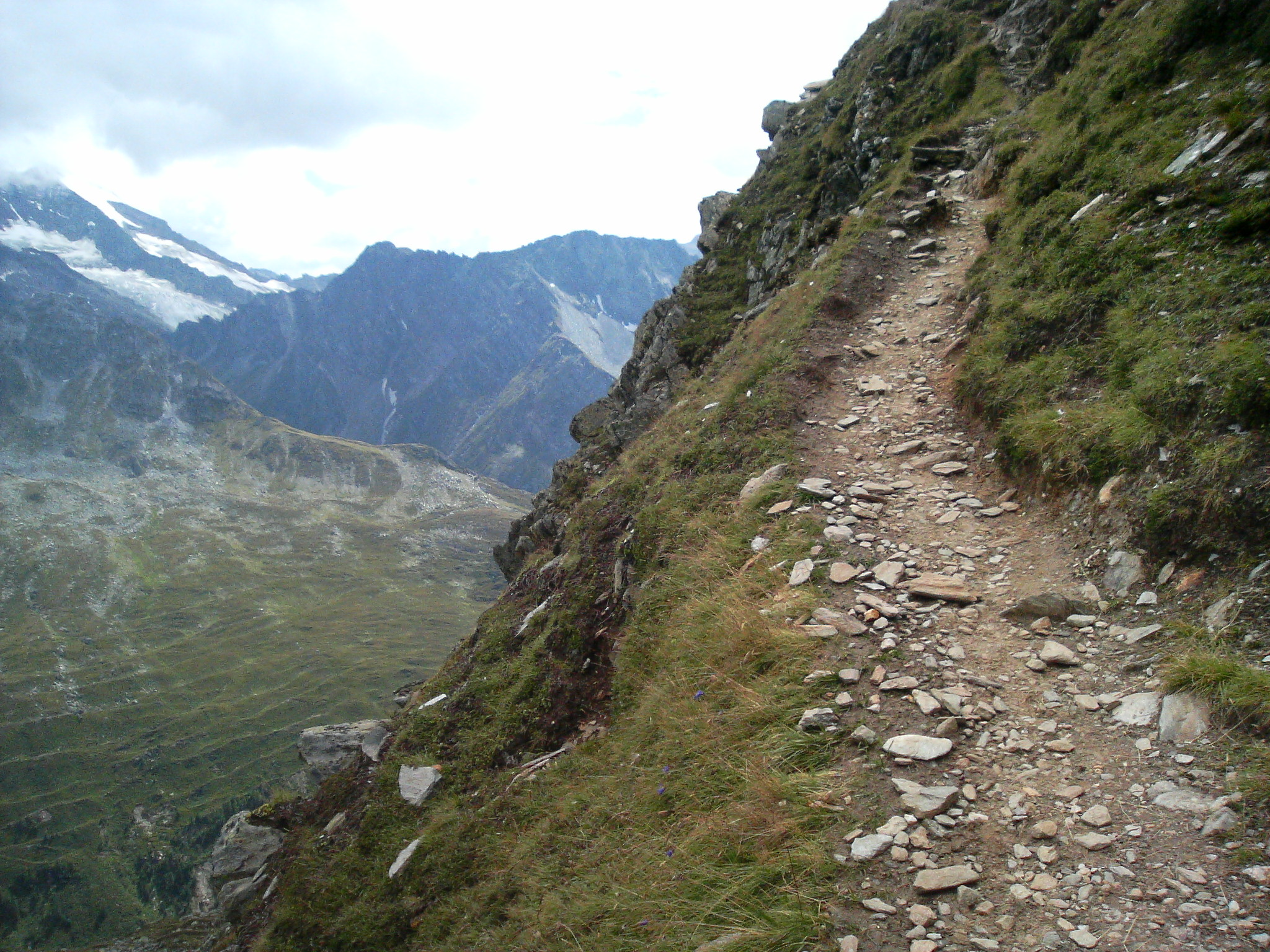 Der Lausitzer Weg zwischen der Neugersdorfer Hütte und der Pfaffenscharte